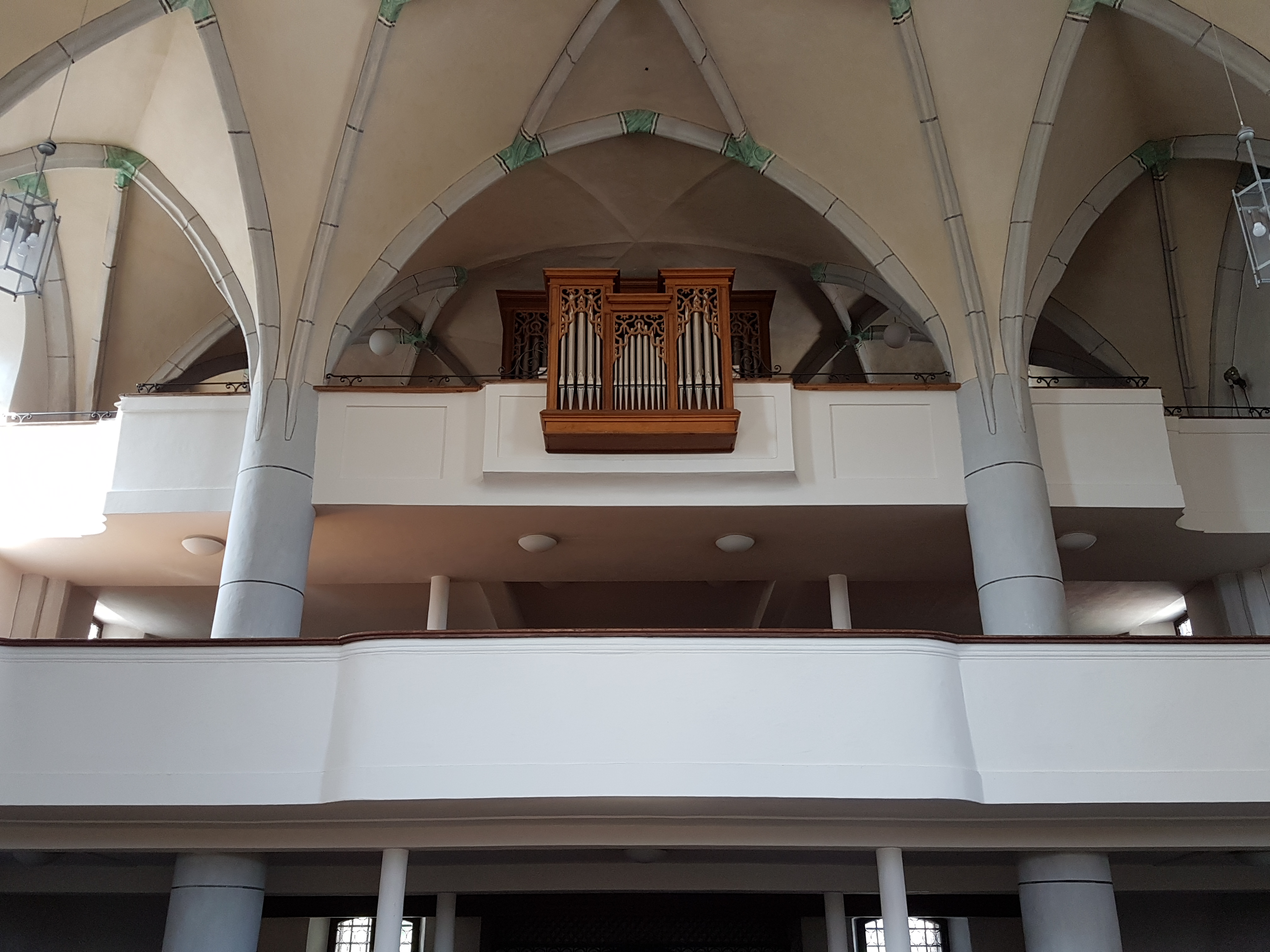 St. Mariä Himmelfahrt (Anger)